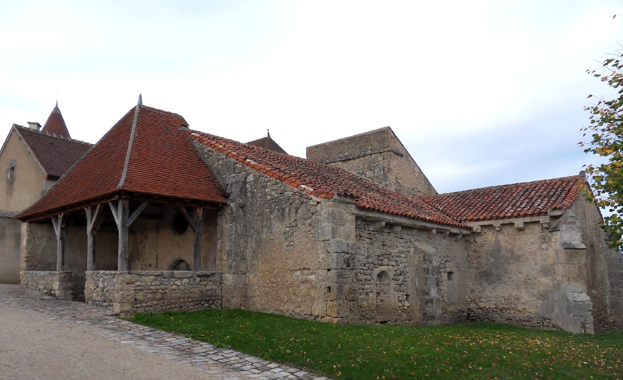 Église Saint-Blaise (Classé) .